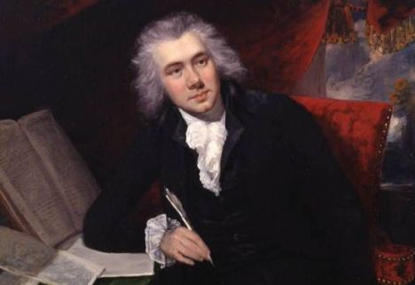 político, filántropo y abolicionista inglés, quien siendo miembro del Parlamento Británico, lideró una campaña en contra de la esclavitud.